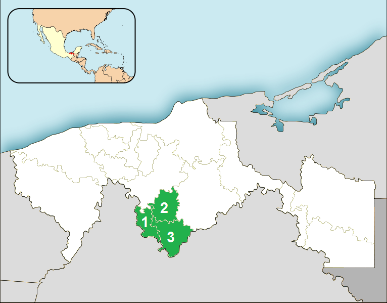 Mapa de la Sub Región de la Sierra en el estado de Tabasco